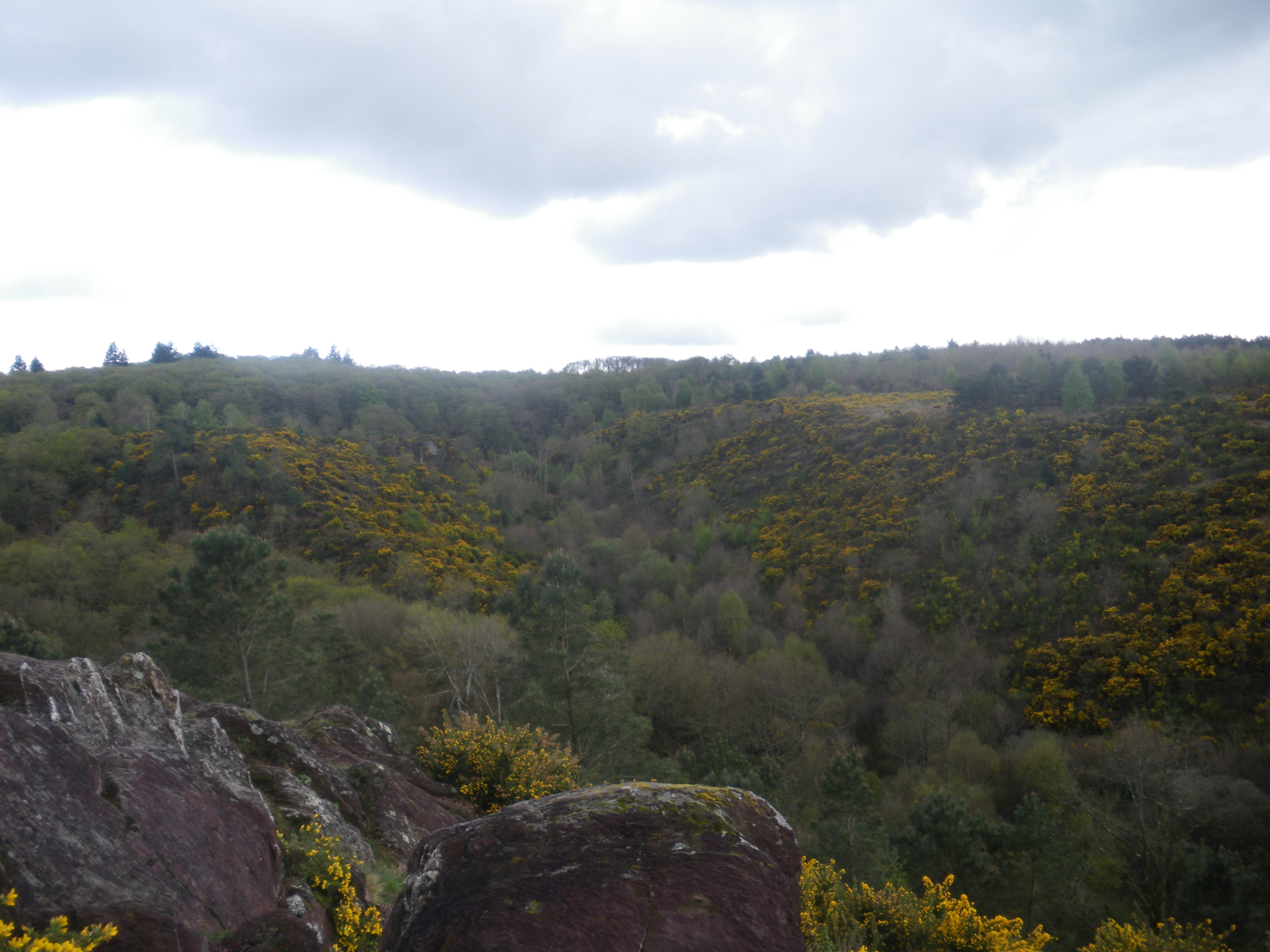 Vue du Val sans Retour en Brocéliande.